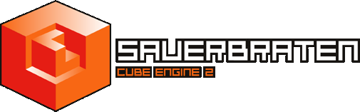 Sauerbraten logo